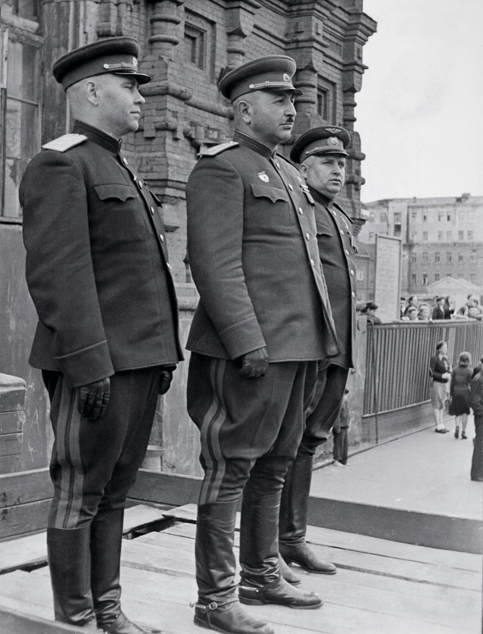 Генерал армии И.Х. Баграмян (в центре)